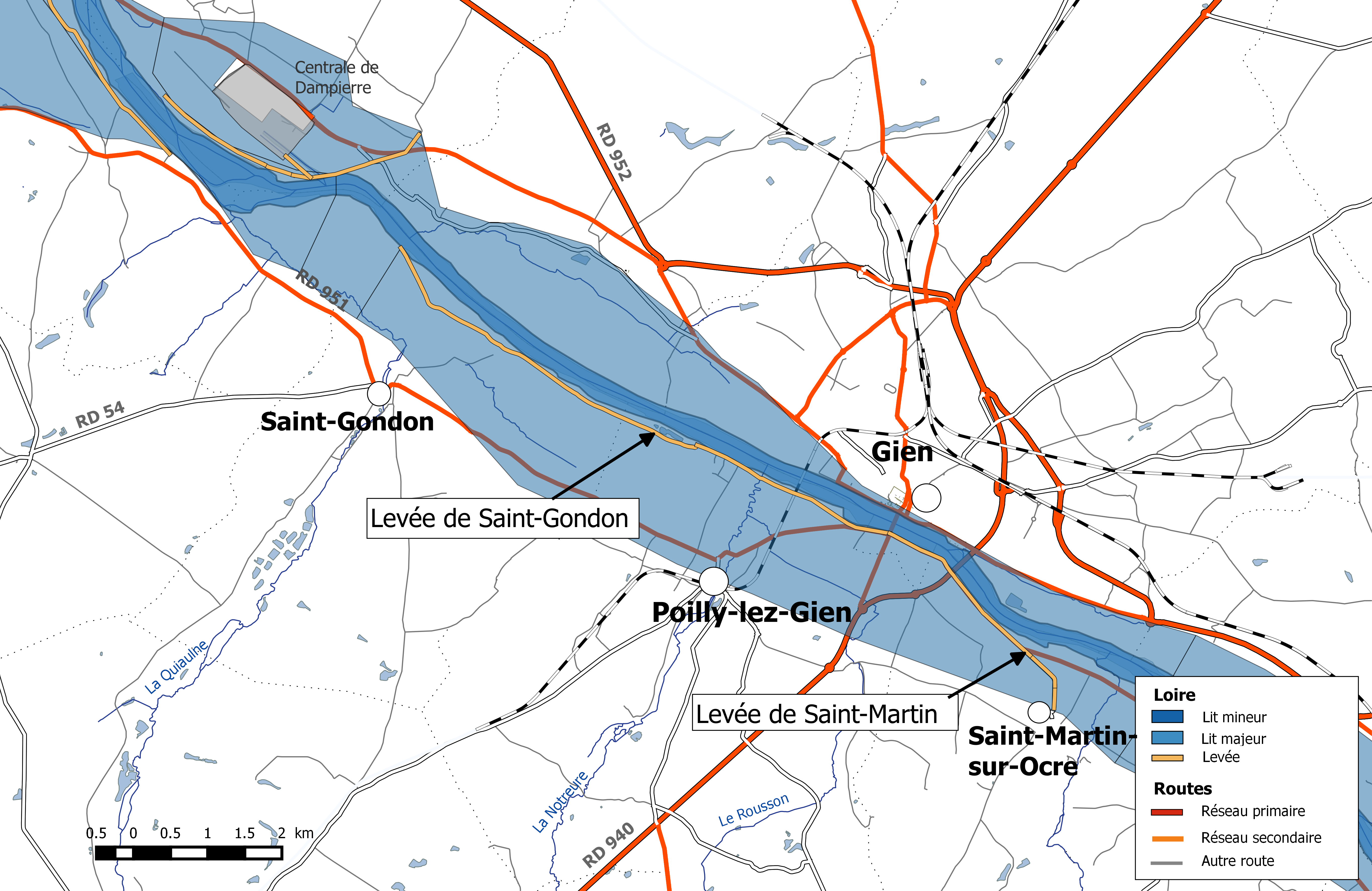 Système d'endiguement de la Loire dans le département du Loiret. Val de Gien.